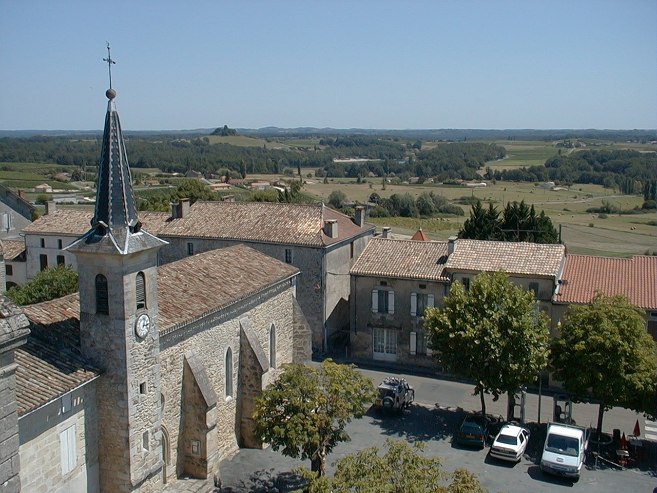 Villefranche de Lonchat (Dordogne)